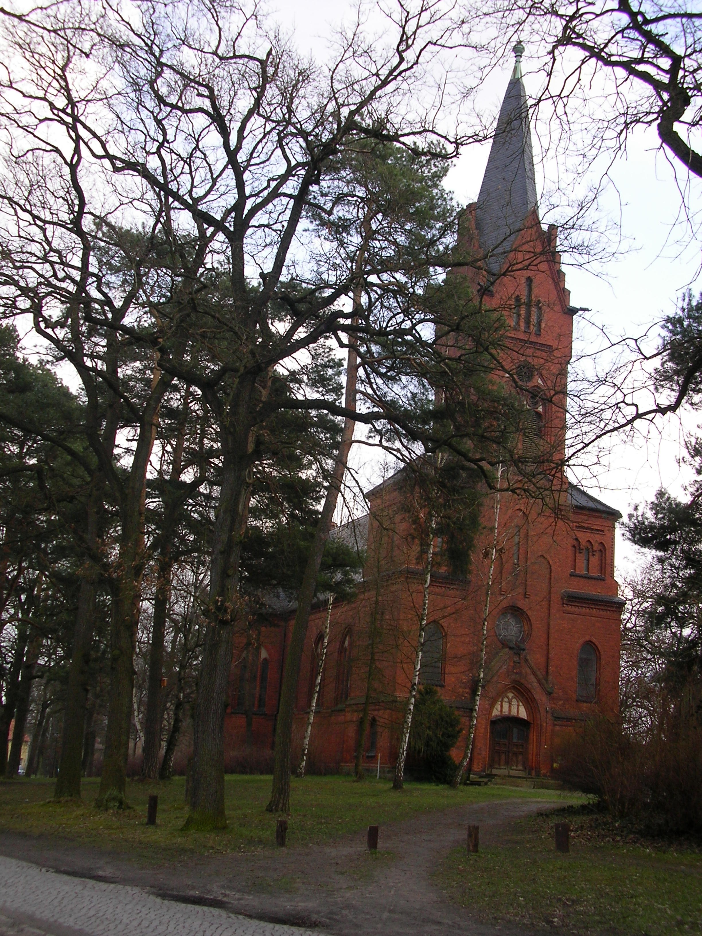 Kirche in Uchtspringe